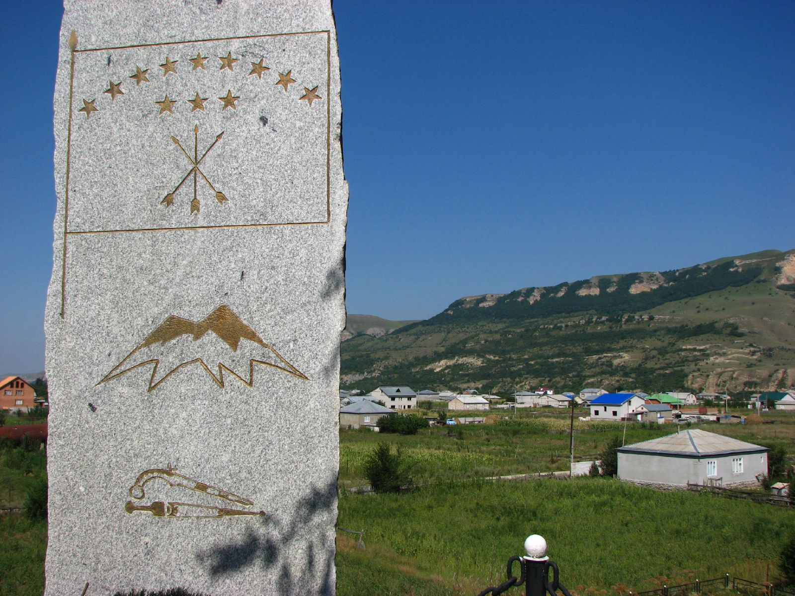 Памятник жертвам Русско-Кавказской войны